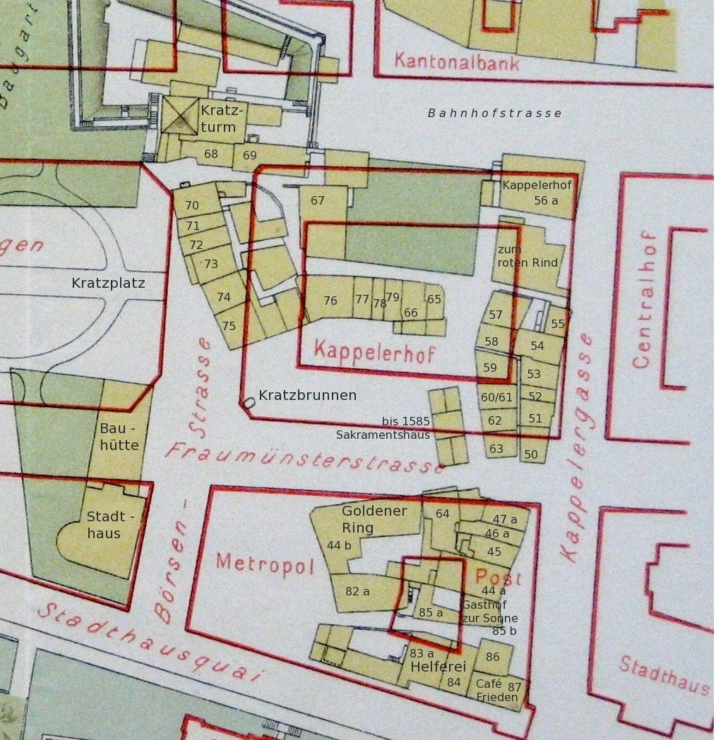 Ausschnitt und Bearbeitung eines Plan von 1902 des Kratzquartiers in Zürich, vor und nach den Neubauten